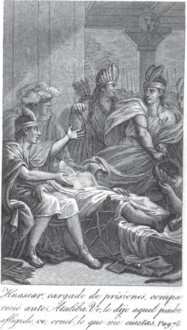 Huáscar